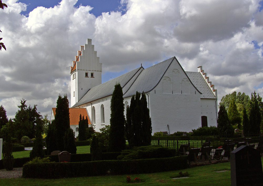 fra sydøst